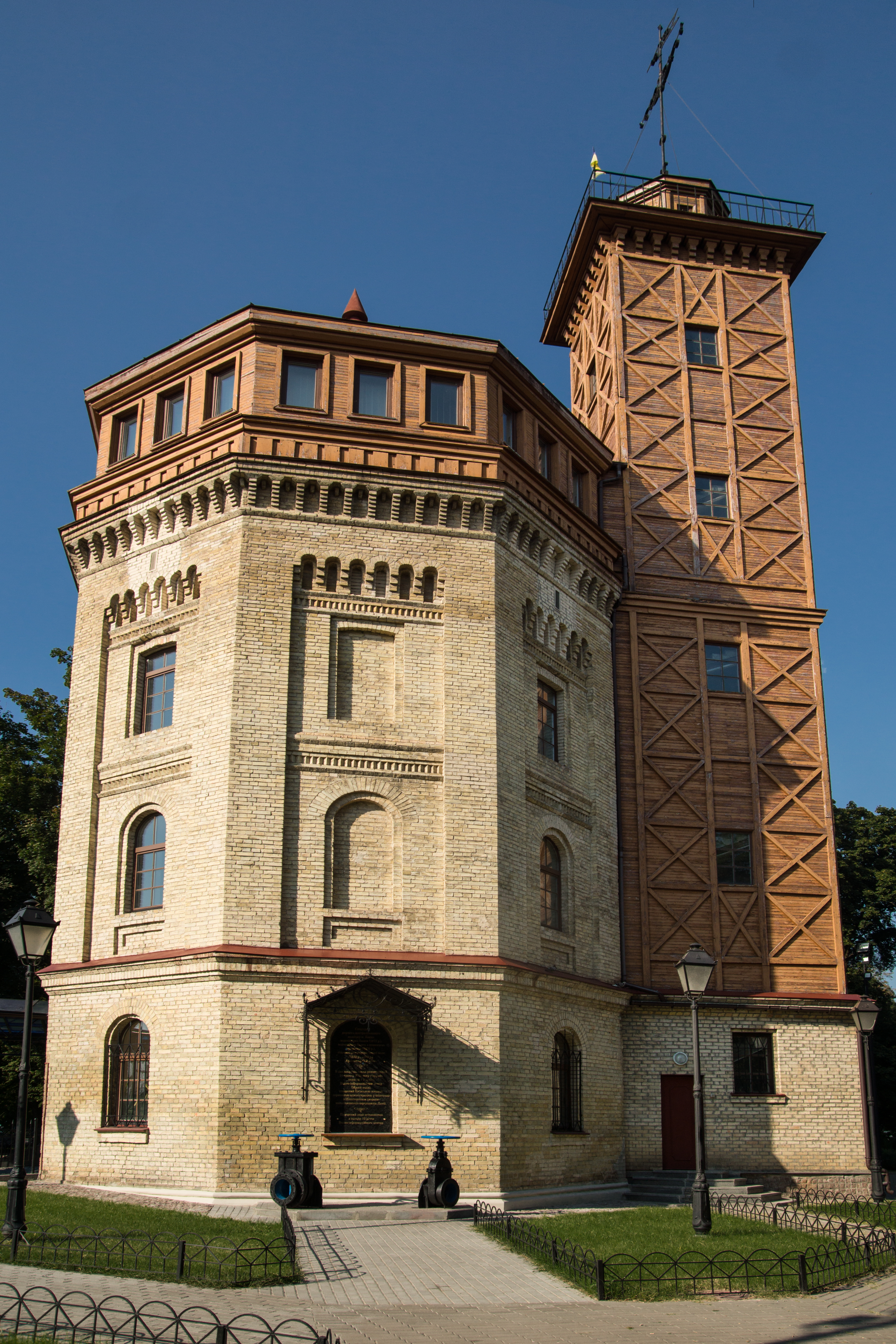 Museo del Agua